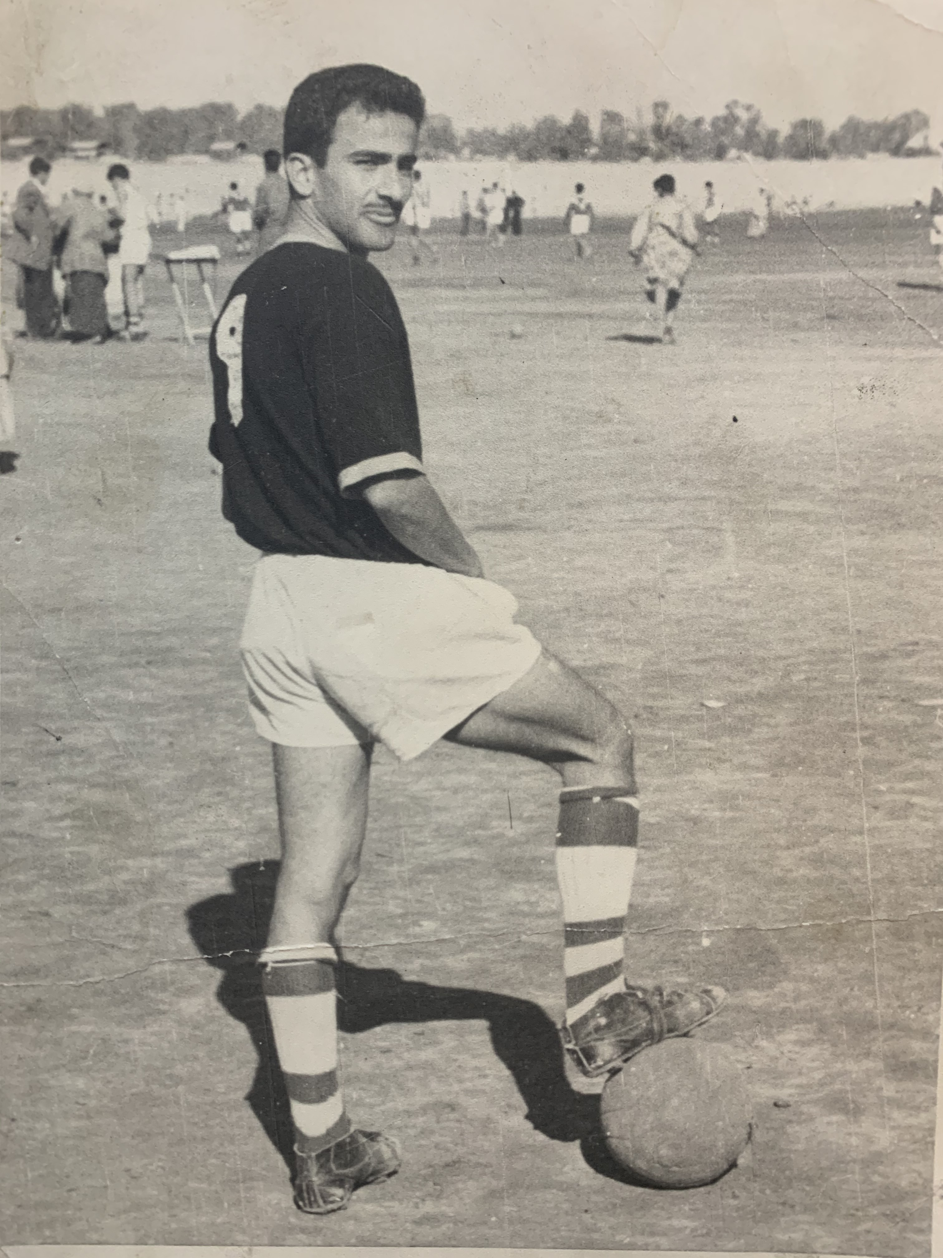 كاظم مجيد وهو لاعب في الطليعة في شبابه